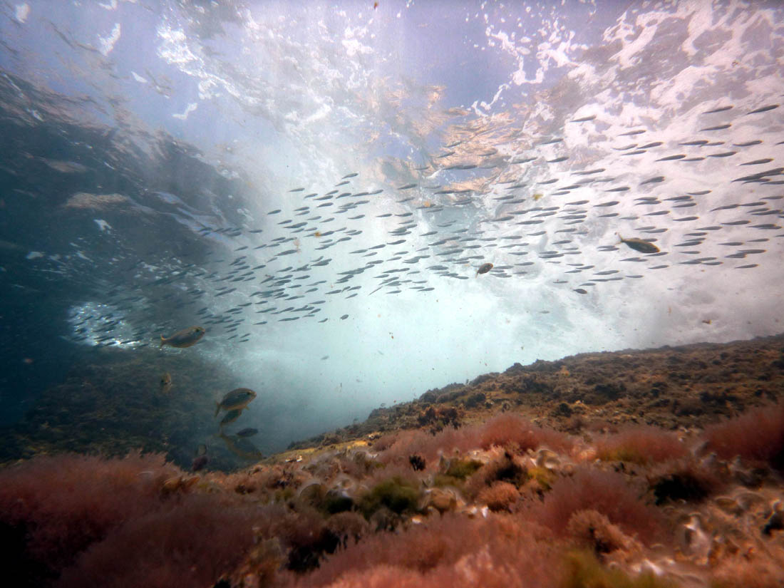 Fotografía submarina de El Portús (Cartagena, Spain)